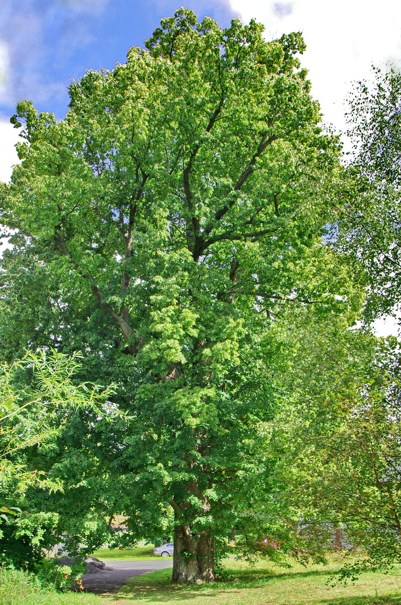 Památný strom Mariánská lípa, Krušné hory, okres Karlovy Vary